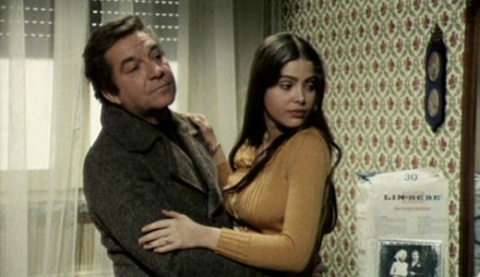 Képkocka az „Olcsó regény” (Romanzo popolare) című filmből